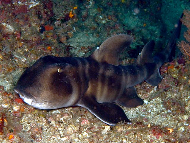 ネコザメ Heterodontus japonicus